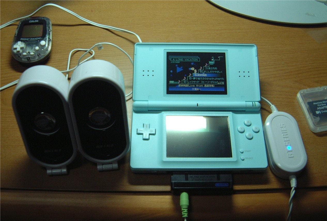 投稿者所有物